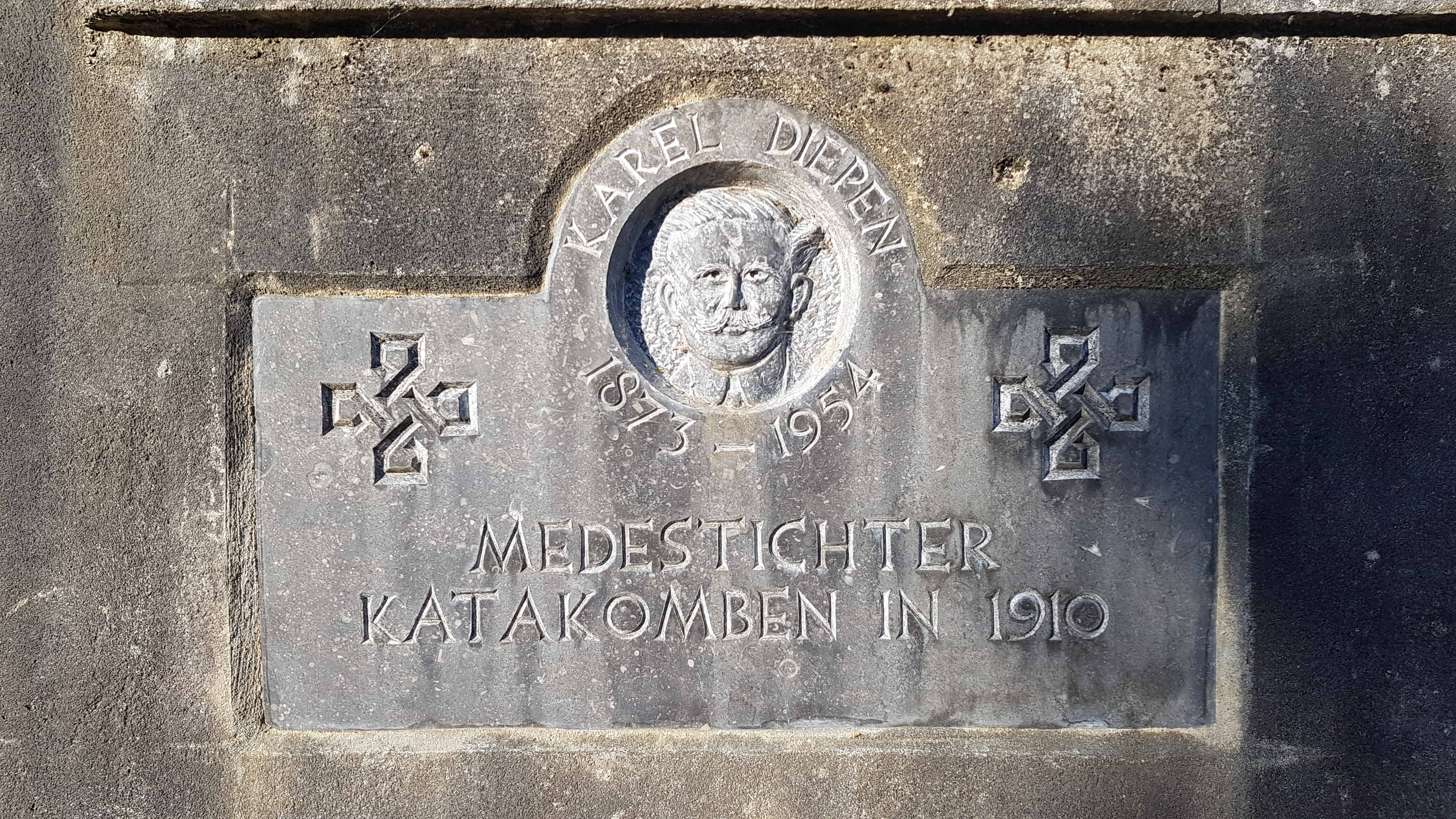 Villa Rozenheuvel, Valkenburg aan de Geul, Nederland